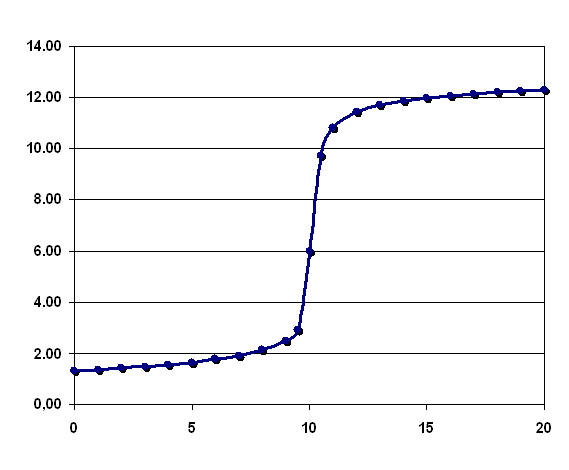 转自de-wp，是:de:Titrationskurve.png的部分内容。